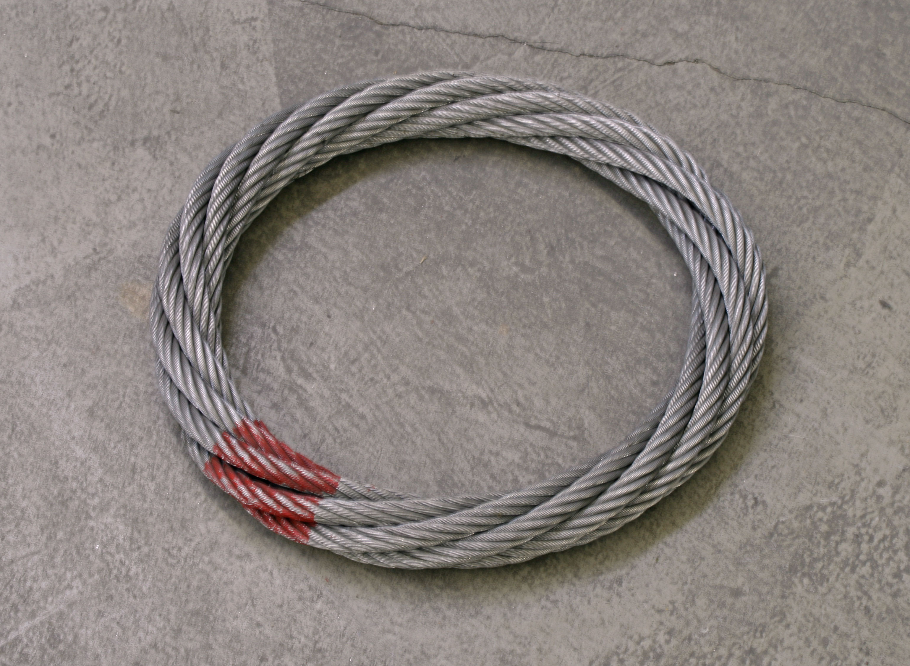 Eng Grumett.